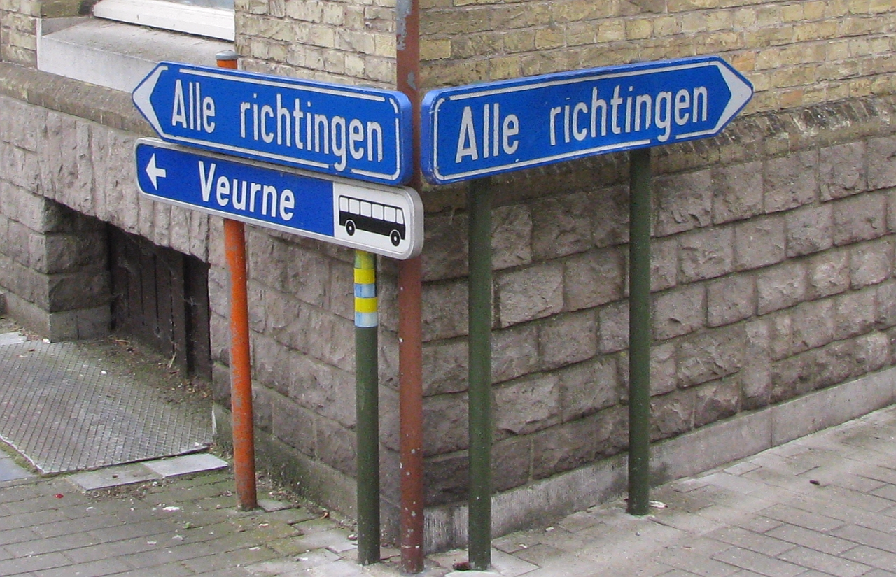 Alle richtingen - verkeersborden in het zuidwesten van de stad Veurne België - Foto Wolfgang Pehlemann IMG_1382.jpg